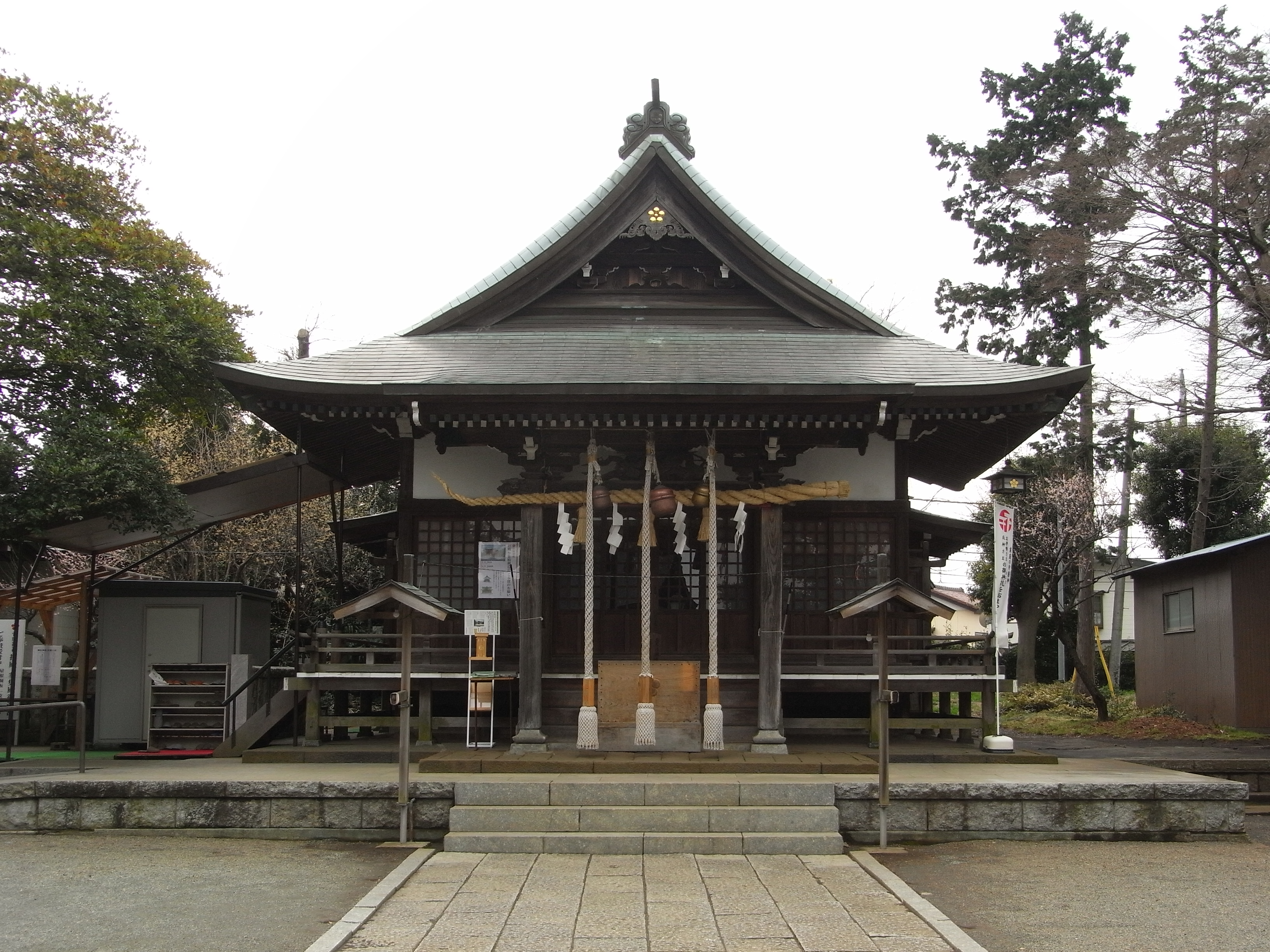 菅原神社 (町田市)の本殿